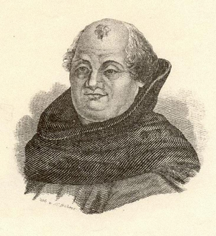 Johann Tetzel